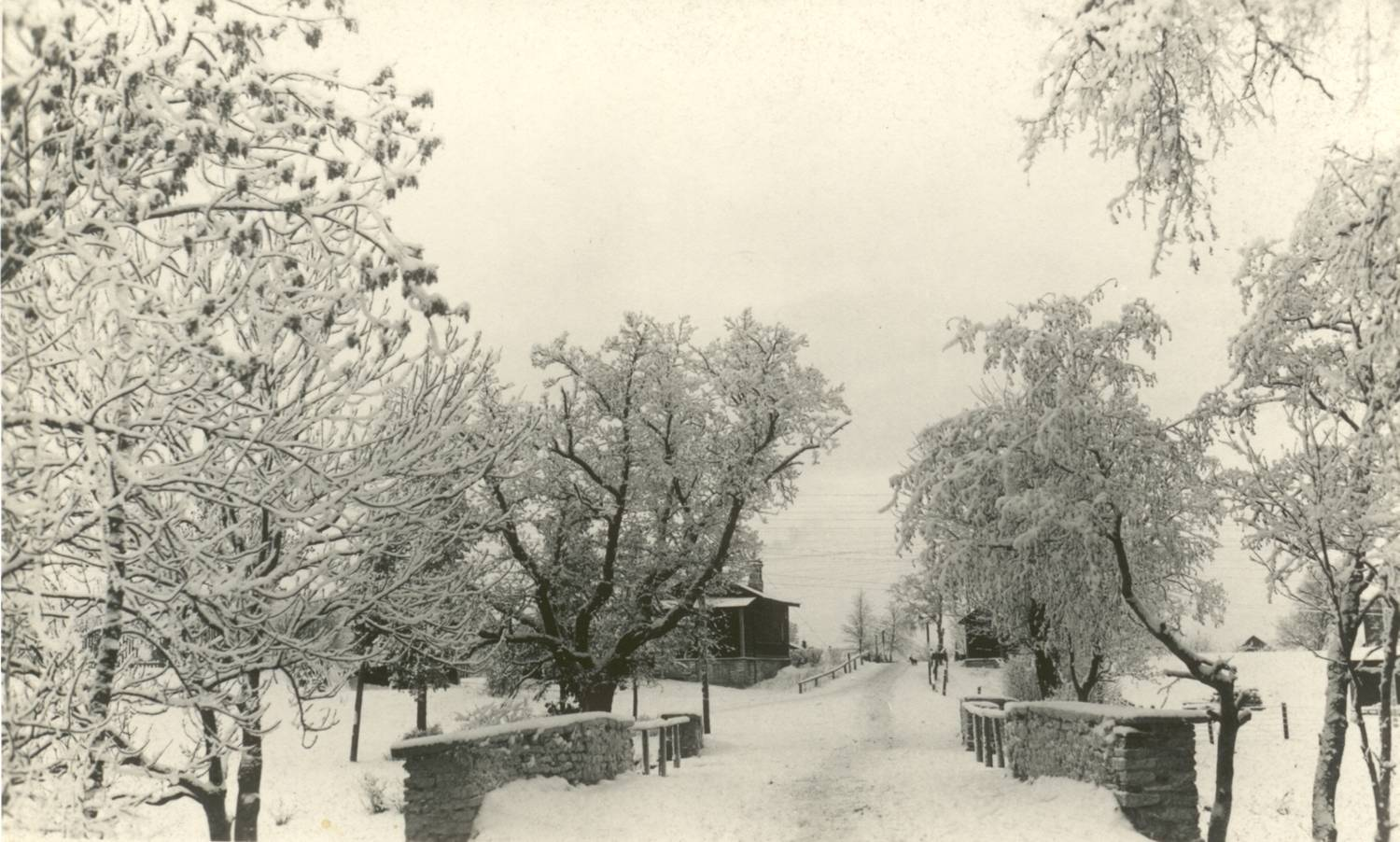 Jõesild Keilas 1930ndatel.